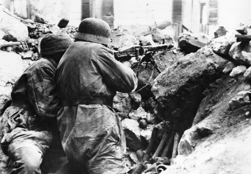 Scherl Bilderdienst Der Heldenkampf von Cassino. Wenn der Gegner glaubt, mit dem Übergewicht seiner Flugzeuge und schweren Waffen die deutschen Linien in Cassino eindrücken zu können, so hat er nicht mit der kämpferischen Überlegenheit und dem beispiellosen Heldenmut der deutschen Fallschirmjäger gerechnet, die jede Ruine zu einer Festung, jeden Trichter zu einem Widerstandsnest machen, das sie nicht nur verteidigen, sondern aus dem heraus sie immer wieder zu Gegenstössen ansetzen. PK-Kriegsberichter Luethge 1.4.1944 [Herausgabedatum]